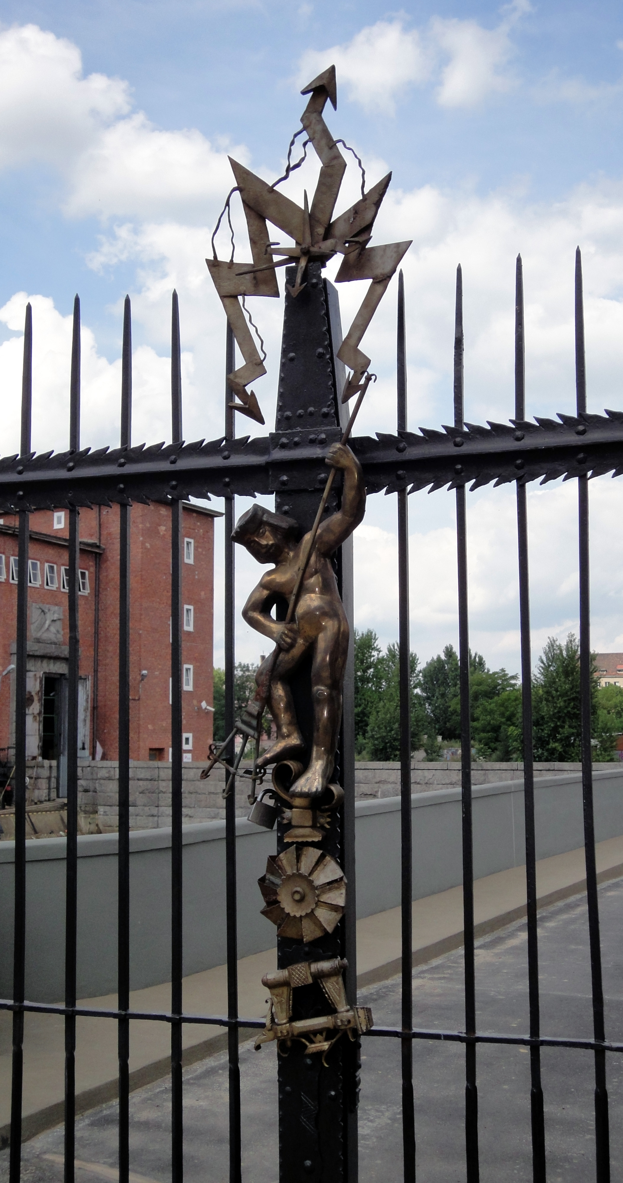 Brama wodnej elektrowni południowej. Detal metaloplastyczny autorstwa Jaroslava Vonki (kopia oryginału)